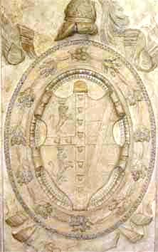 Antico stemma Massimo che decora il soffitto del portico del Palazzo Massimo alle colonne in Roma